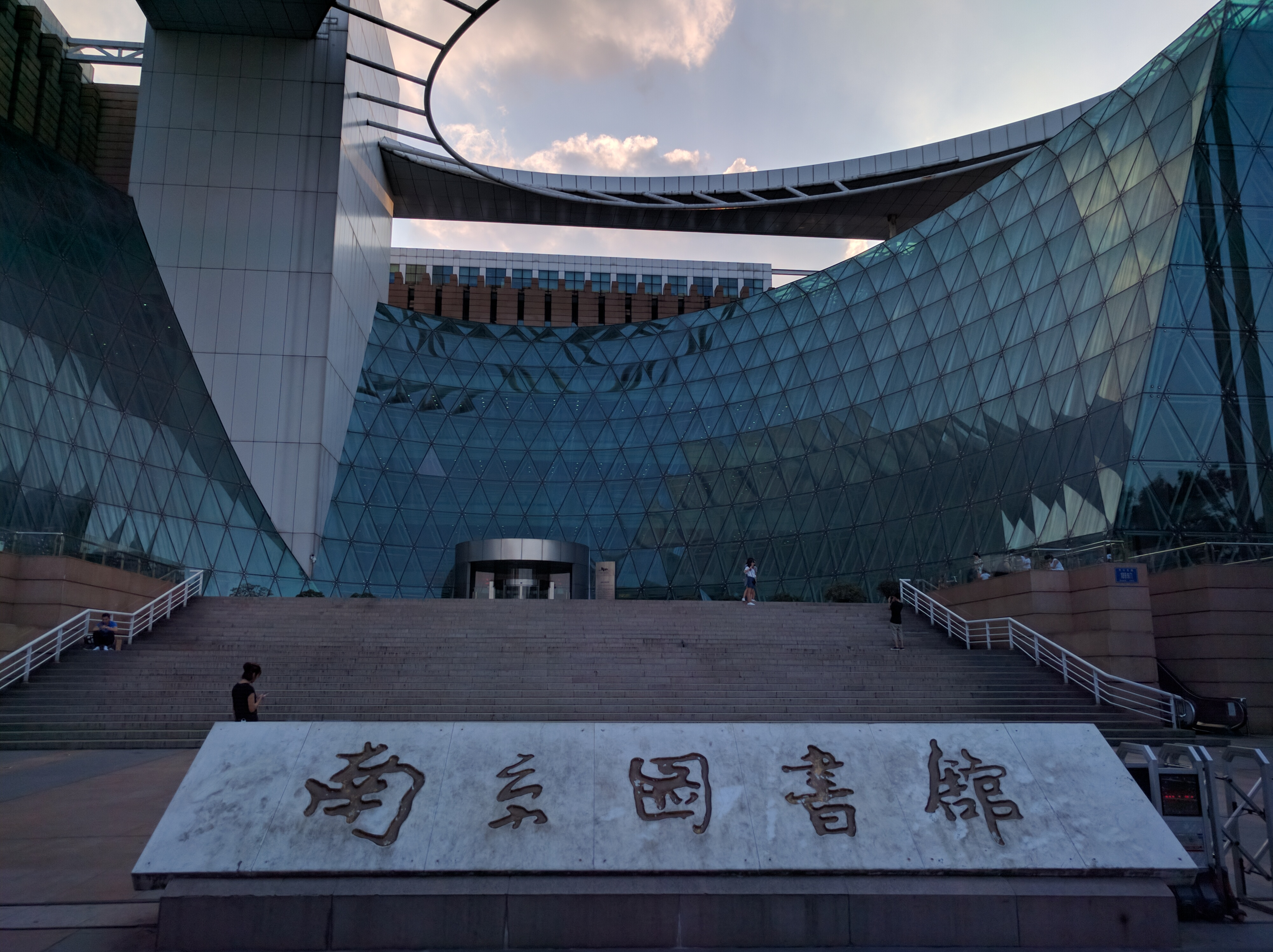 中文（中国大陆）: 南京图书馆